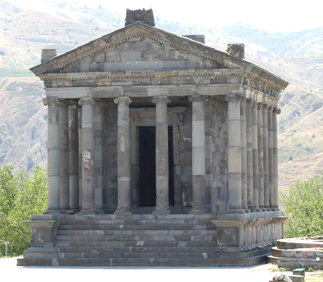 Ամրոցը գտնվում է Գեղամա լեռնաշղթայի Գեղասար գագաթի հարավային ստորոտում՝ ծովի մակերևույթից շուրջ 1400 մ բարձրության վրա։ Հանդիսանում է հայկական ճարտարապետության անտիկ ժամանակաշրջանի ամրաշինության կառույց։